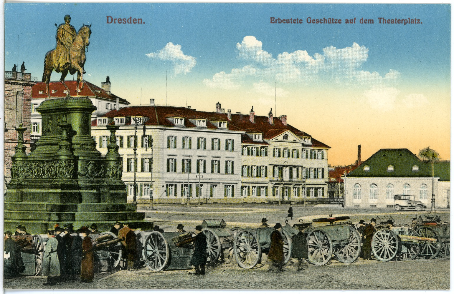 Dresden; Erbeutete Geschütze auf dem Theaterplatz This postcard is from publisher Brück & Sohn in Meißen ( This postcard has a unique number 18608 and is available in a higher resolution at the publisher. This images was uploaded in a cooperation project between Wikipedians and the publisher.